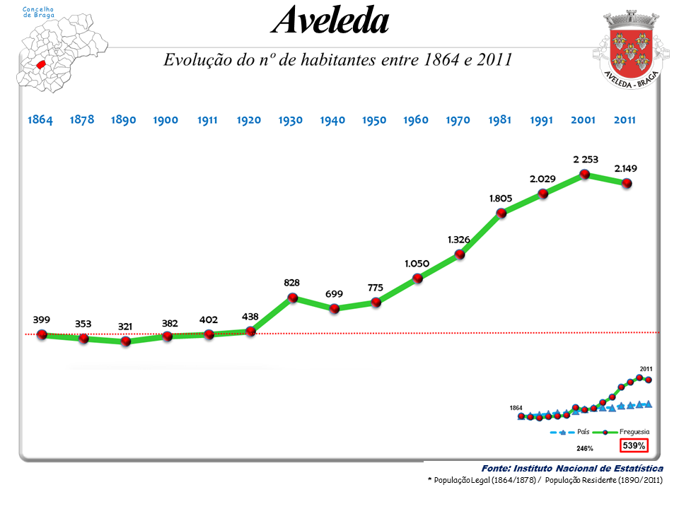 Censos 1864/2011